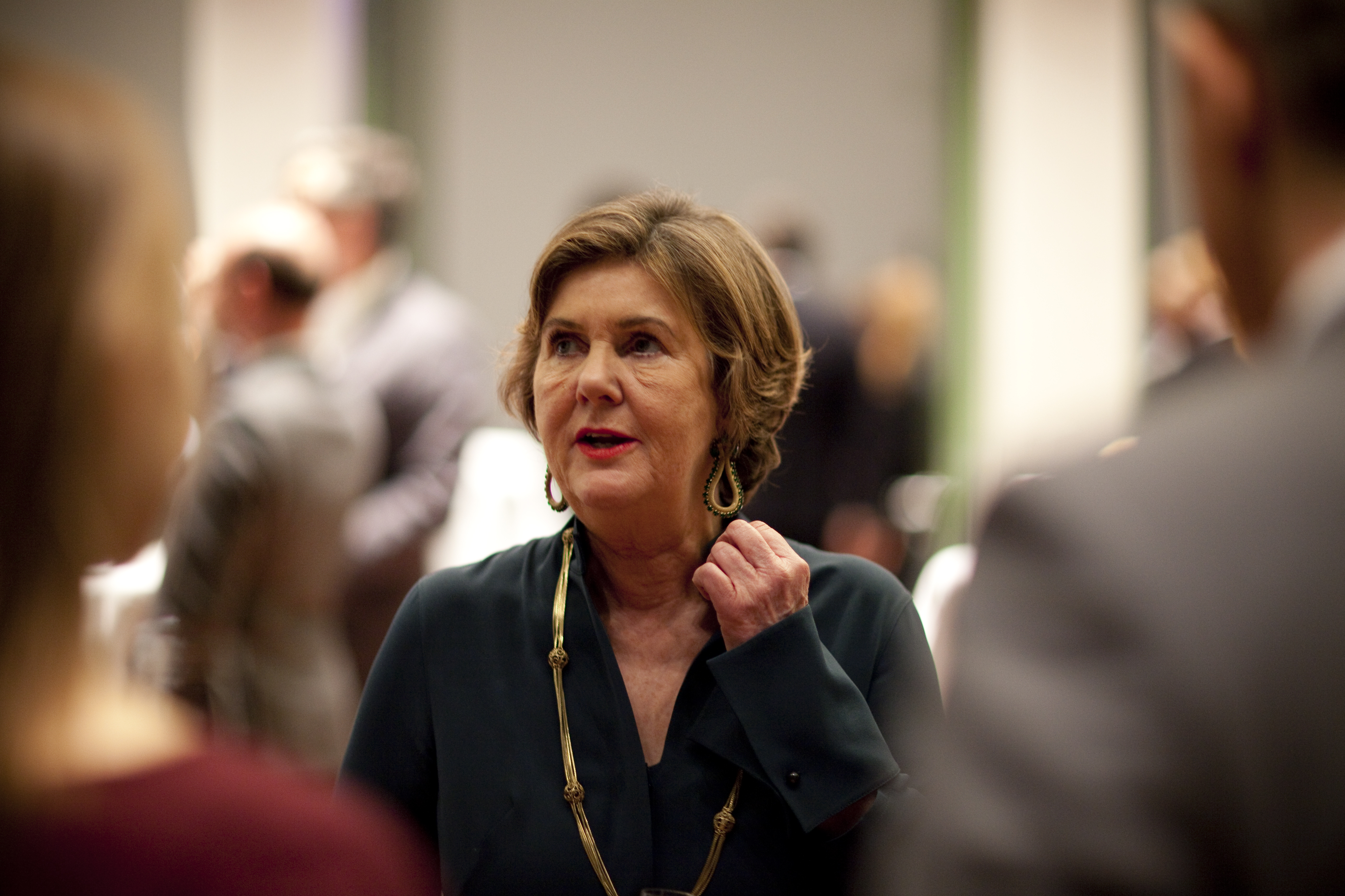 Festkonzert anlässlich des AT-Ratsvorsitzes